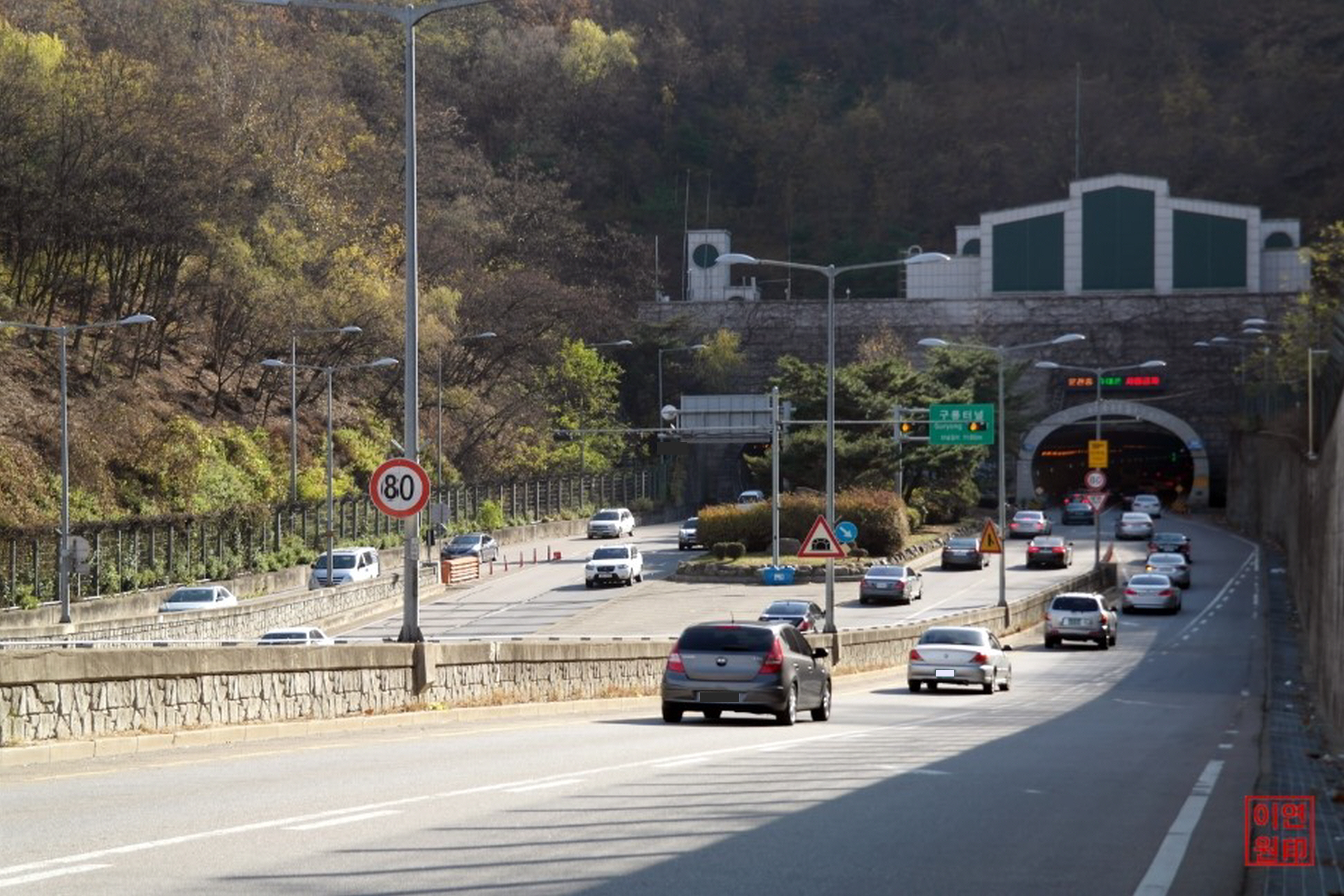 양재대로 구룡터널 모습